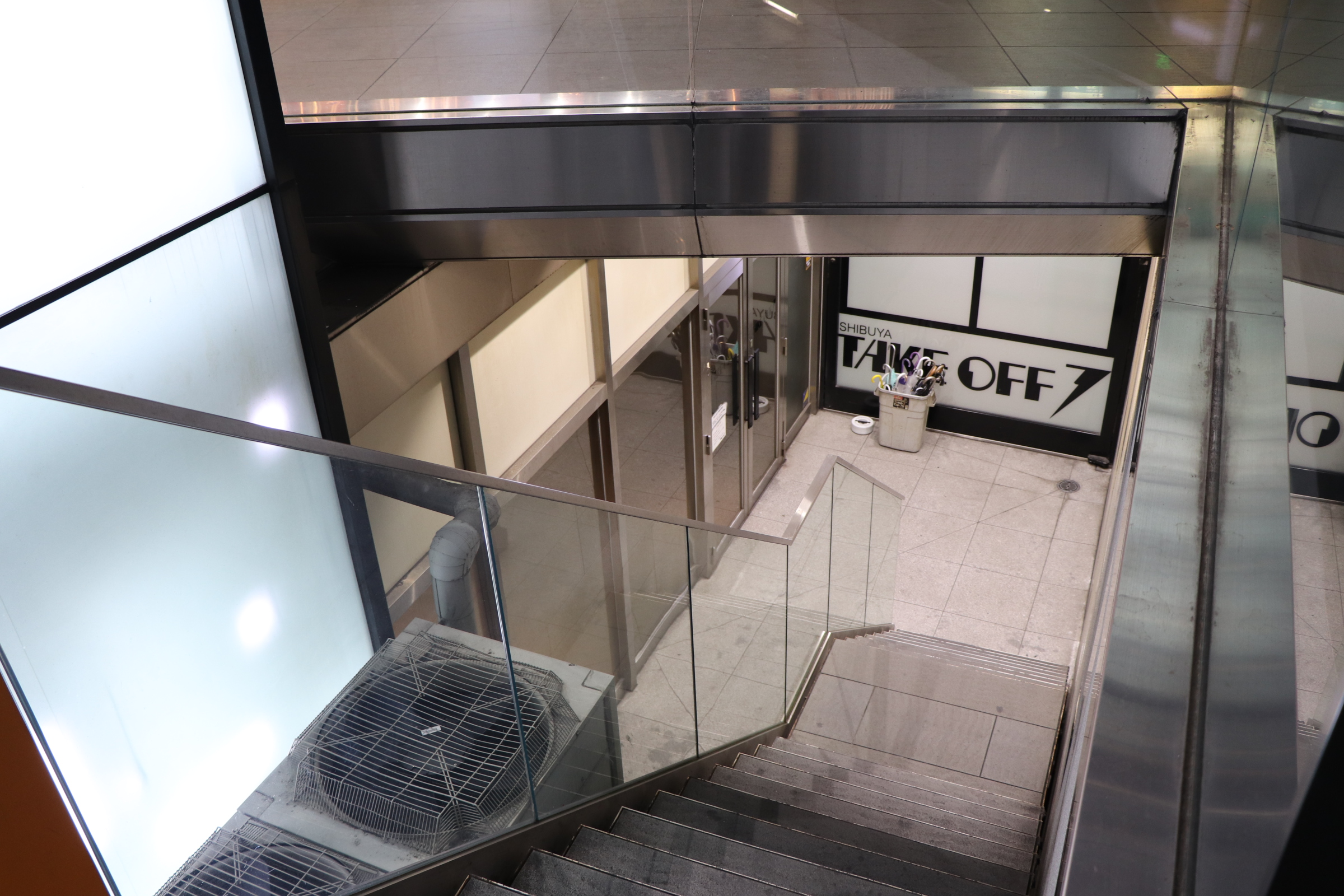 TAKEOFF7